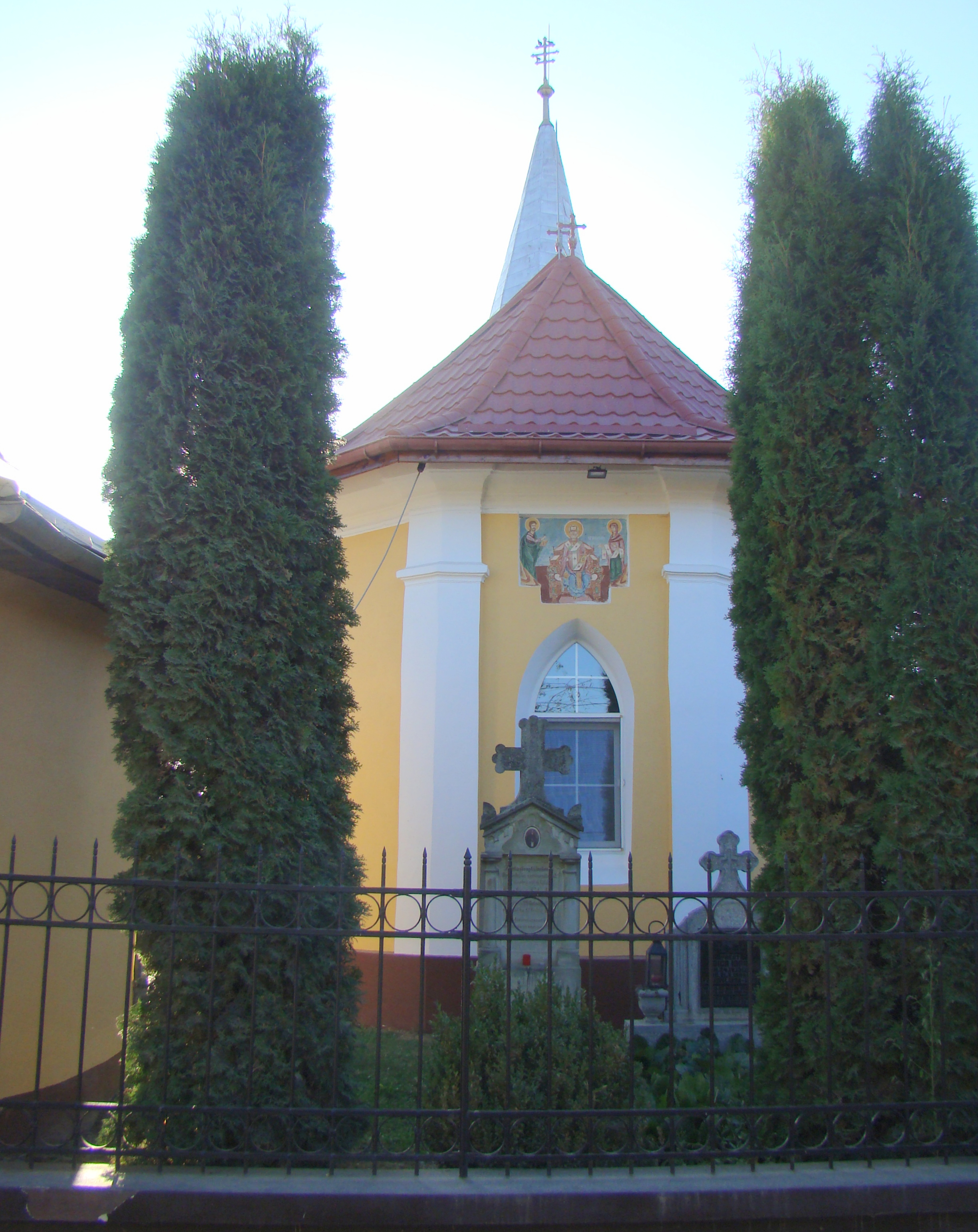 Ansamblul bisericii „Sf. Nicolae”, sat Voivodeni; comuna Voila 221 sec. XVIII